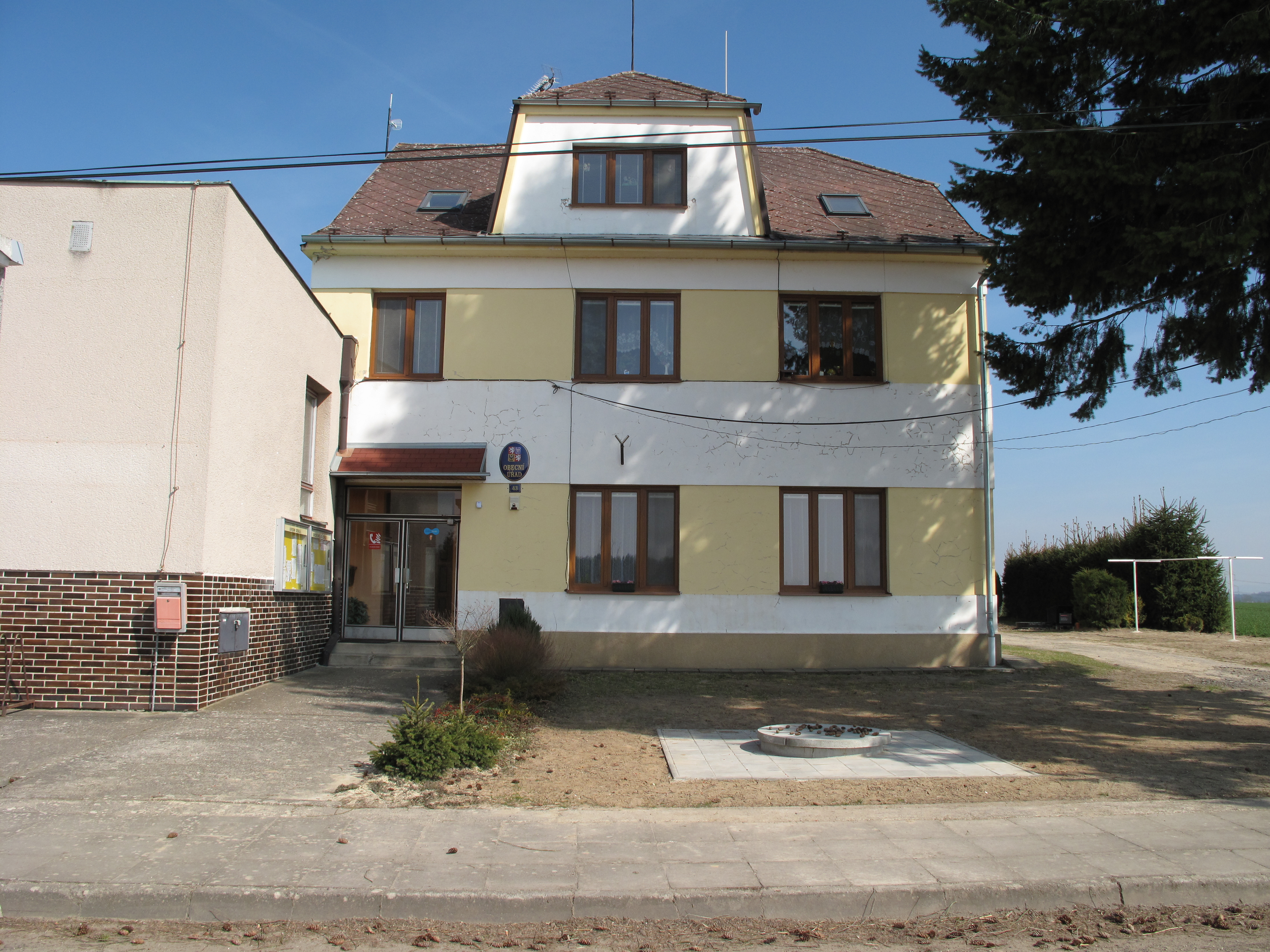 Obecní úřad v Chocnějovicích. Okres Mladá Boleslav, Česká republika.